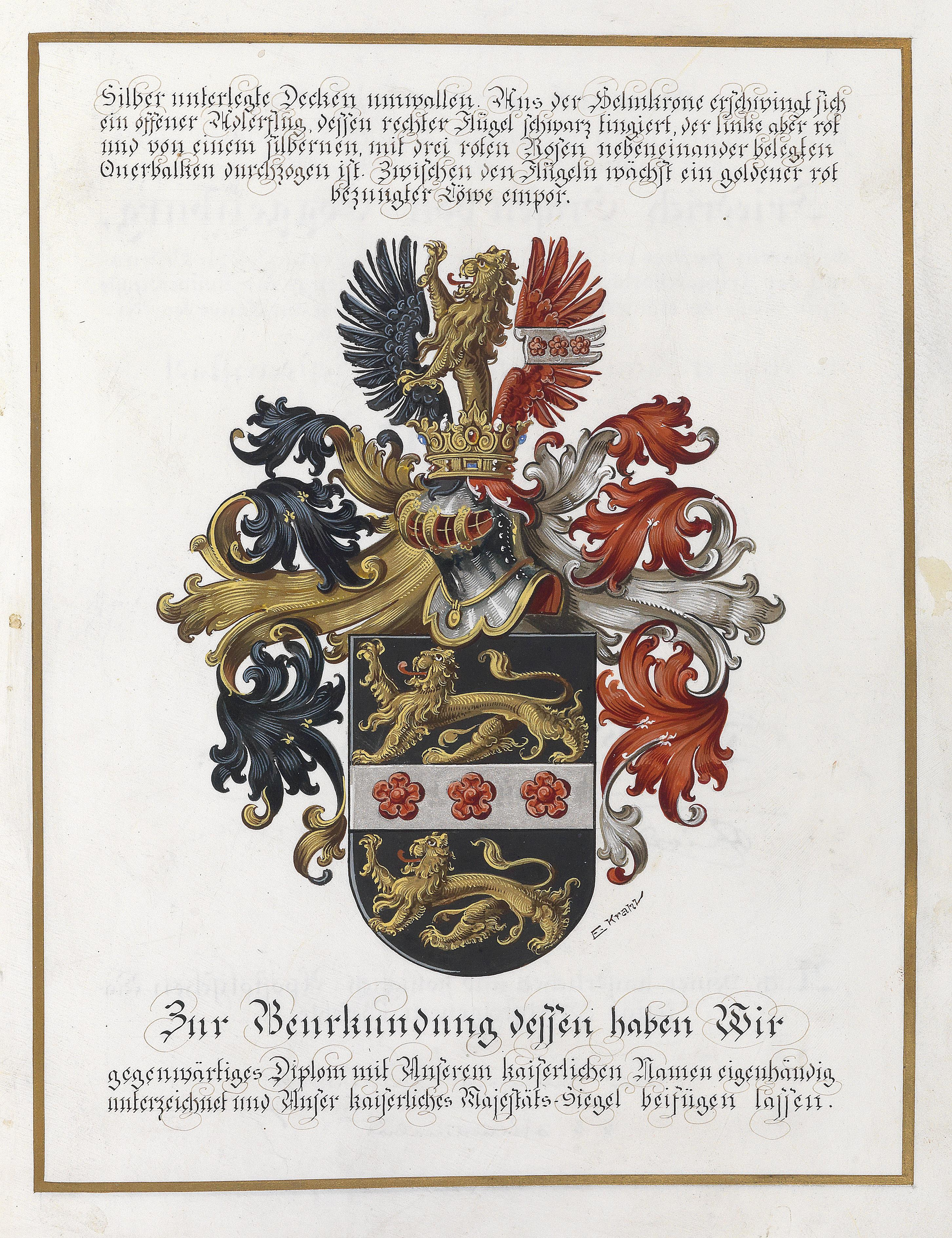 Adels-, Wappen- und Prädikatsübertragungsdiplom durch Kaiser Karl I. von Österreich für Gustav von Metz-Kaler zu Lanzenheim, Wien, 8. Februar 1918, Detail: Wappendarstellung, signiert E. Krahl